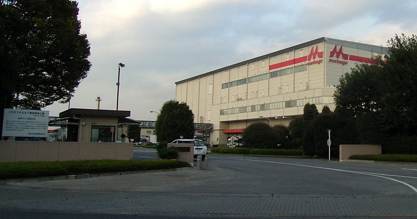 MorinagaMilk-Industry Company Higashiyamato,factory Tokyo 森永乳業株式会社東京多摩工場・大和工場 東京都東大和市立野4-515